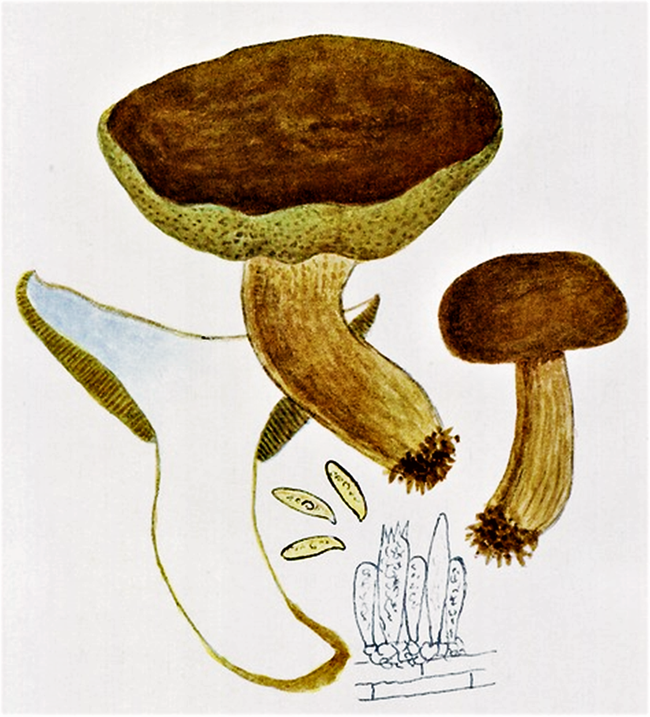 Giacomo Bresadola: Boletus badius (Elias Magnus Fries|Fr. , 1818 ex Fr. 1832